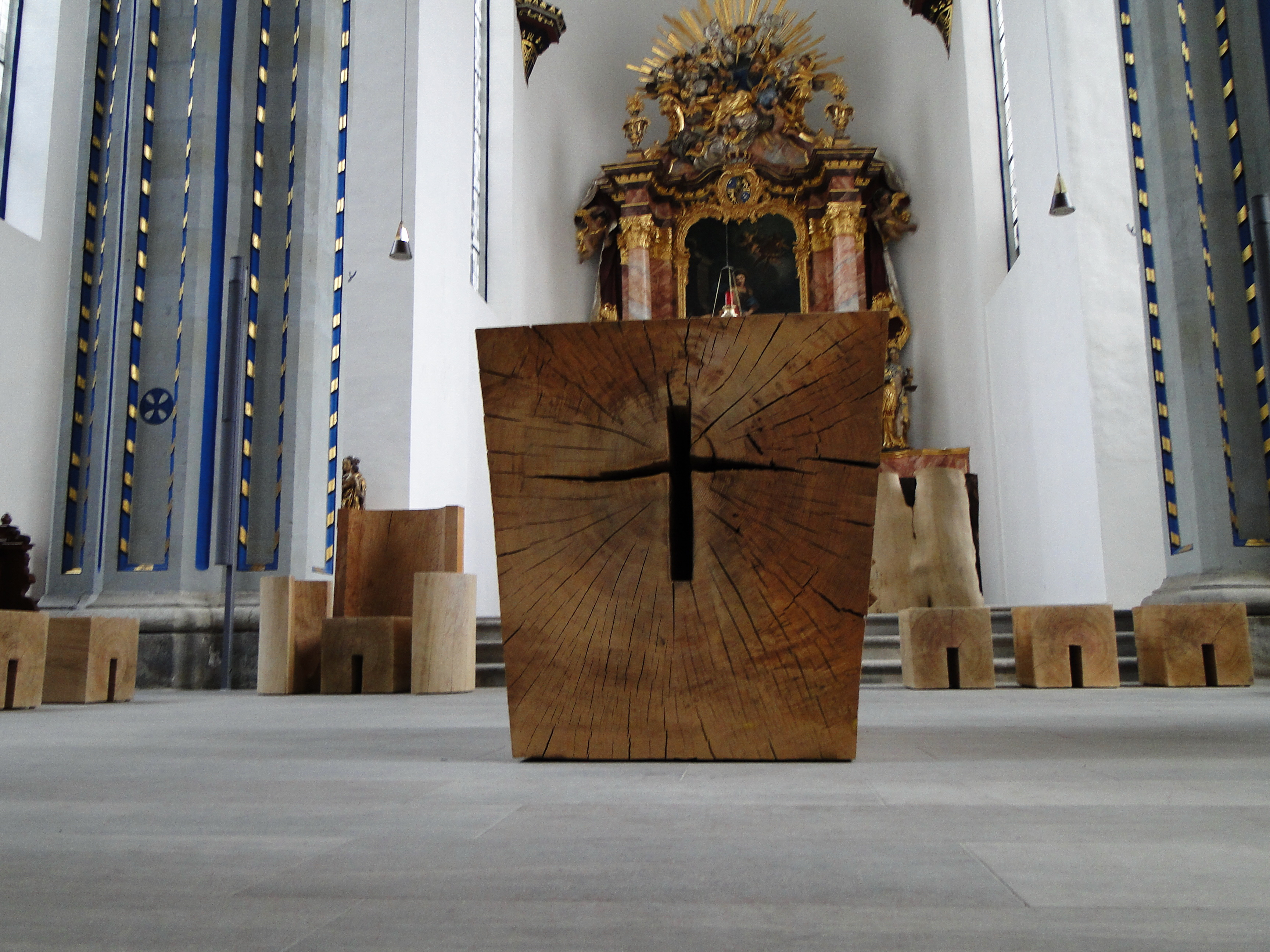 Namen-Jesu-Kirche in der Bonner Bonngasse. Der Altar wurde 2011 durch den Künstler Klaus Simon geschaffen.